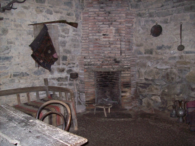 ჩარგალი. ვაჟა-ფშაველას სახლ-მუზეუმი